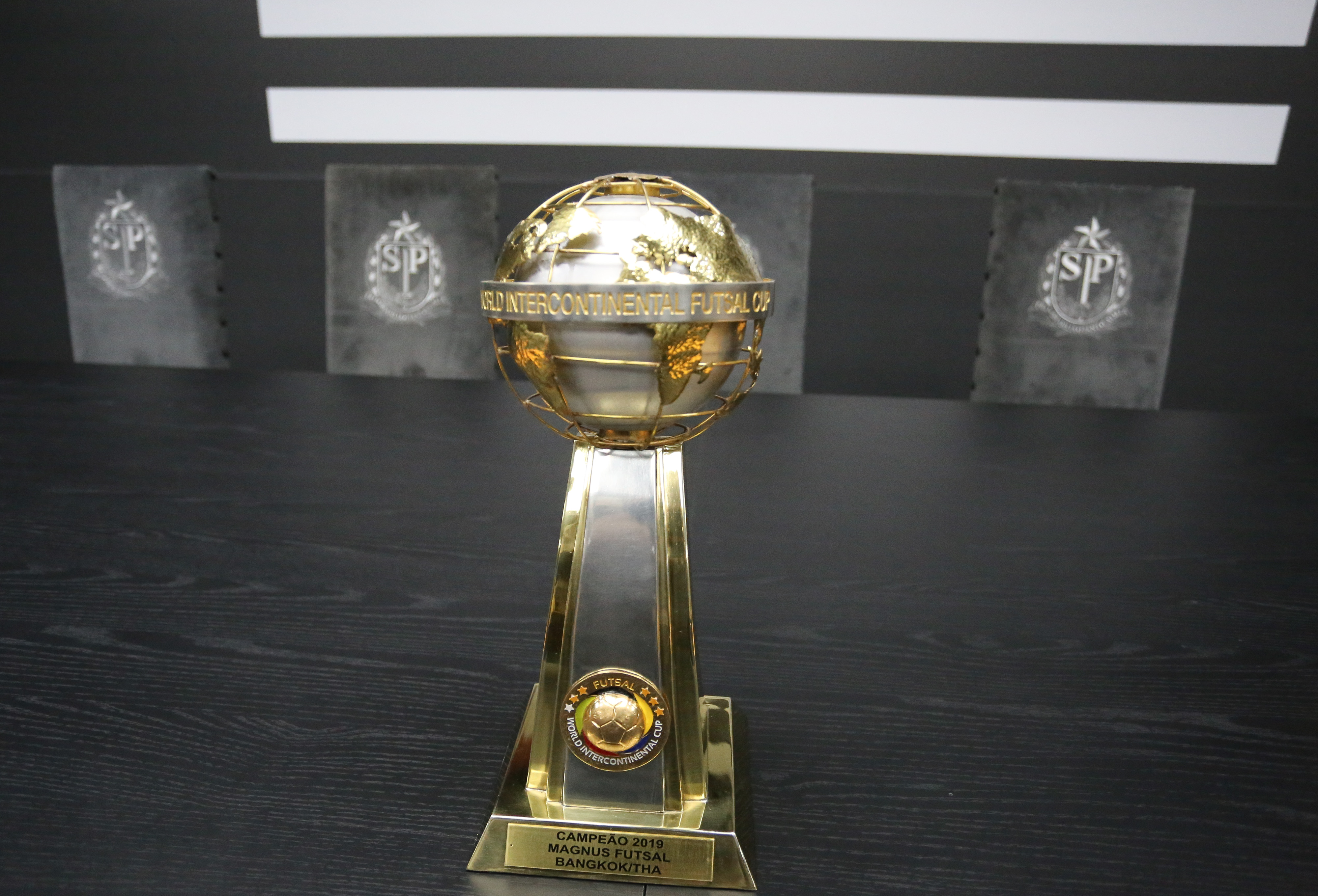 O Governador do Estado de São Paulo, João Doria, com o time Tricampeão Mundial de Futsal de Sorocaba. Local: São Paulo-SP. Data: 04/102019 Foto: Governo do Estado de São Paulo